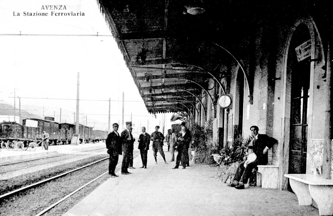 Un'immagine della stazione di Carrara-Avenza nel 1926, dove si vede la banchina del binario 1. Sullo fondo si può notare il fabbricato merci e vari carri merci carichi sul piazzale a sinistra.